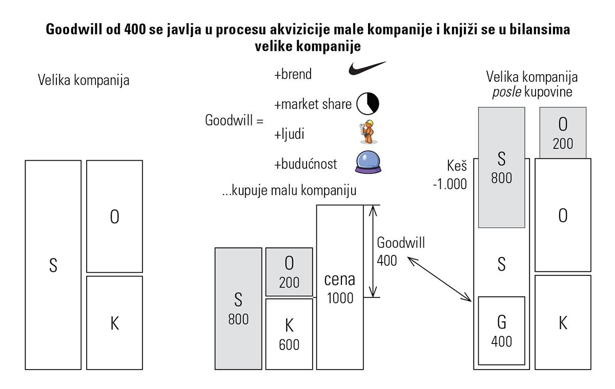 Опис Гудвила